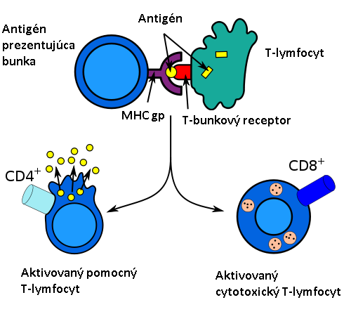 Aktivácia T-lymfocytu